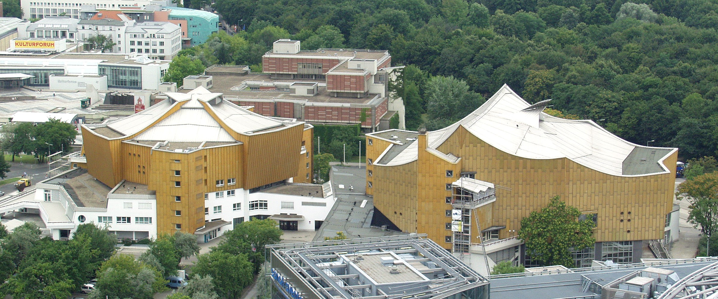 Philharmonie und Kammermusiksaal Berlin von oben